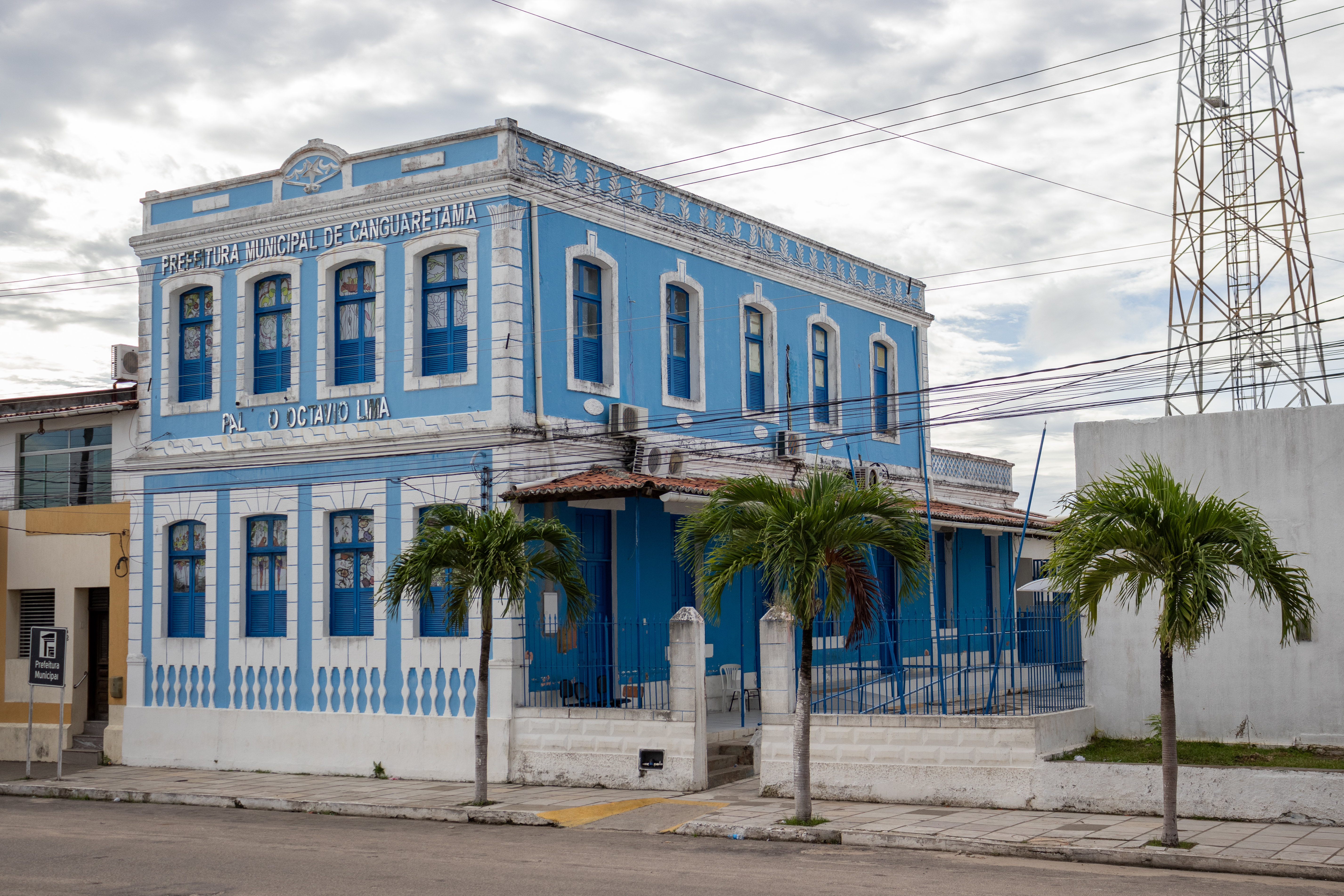 Essa imagem mostra a frente da Prefeitura do municipio Canguaretama.